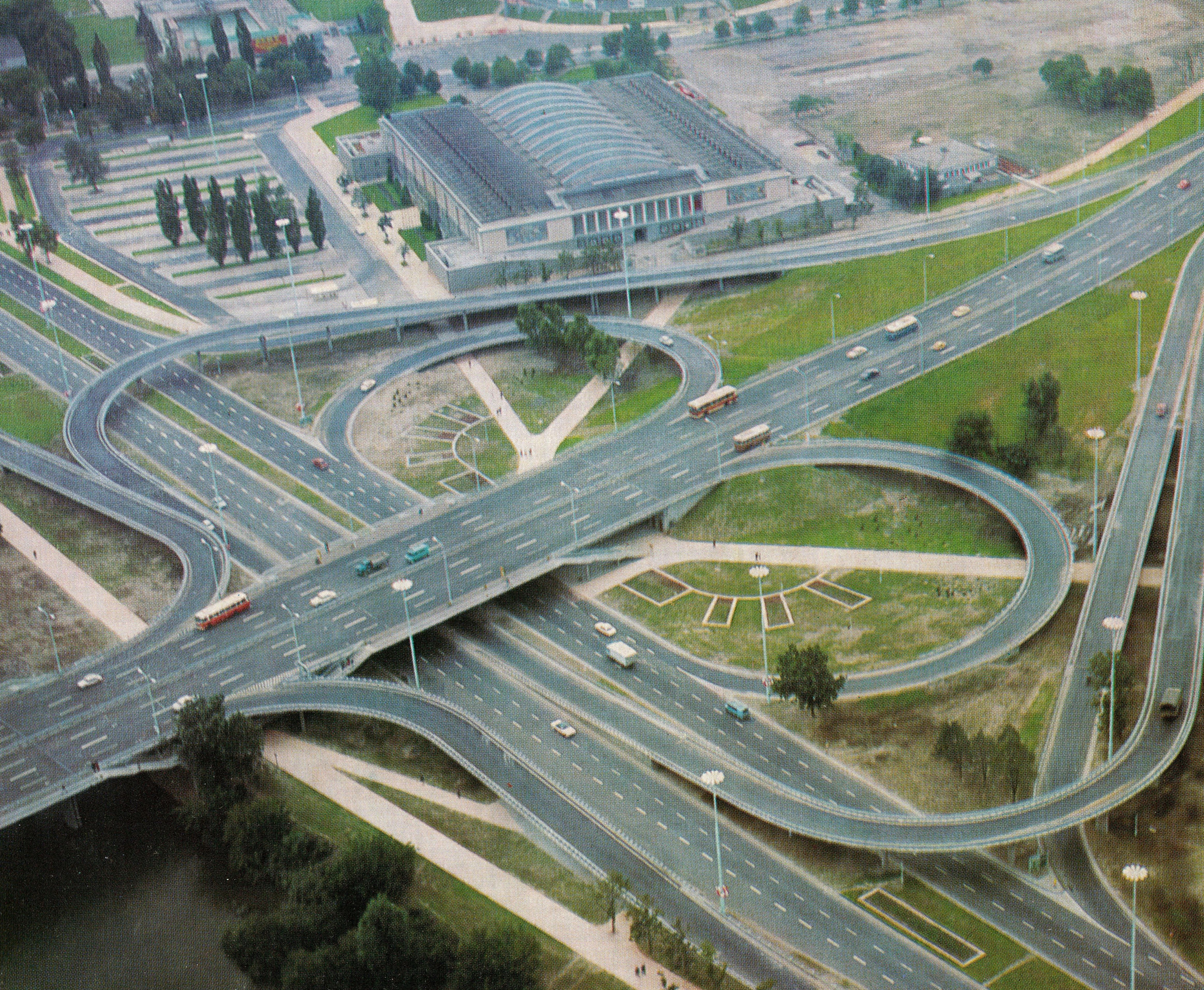 Bezkolizyjny węzeł drogowy Trasa Łazienkowska - Wisłostrada